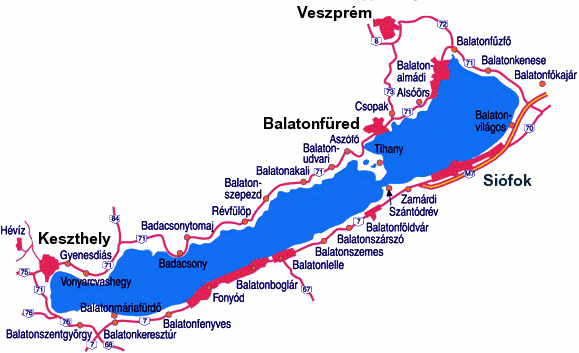 Balaton.gif